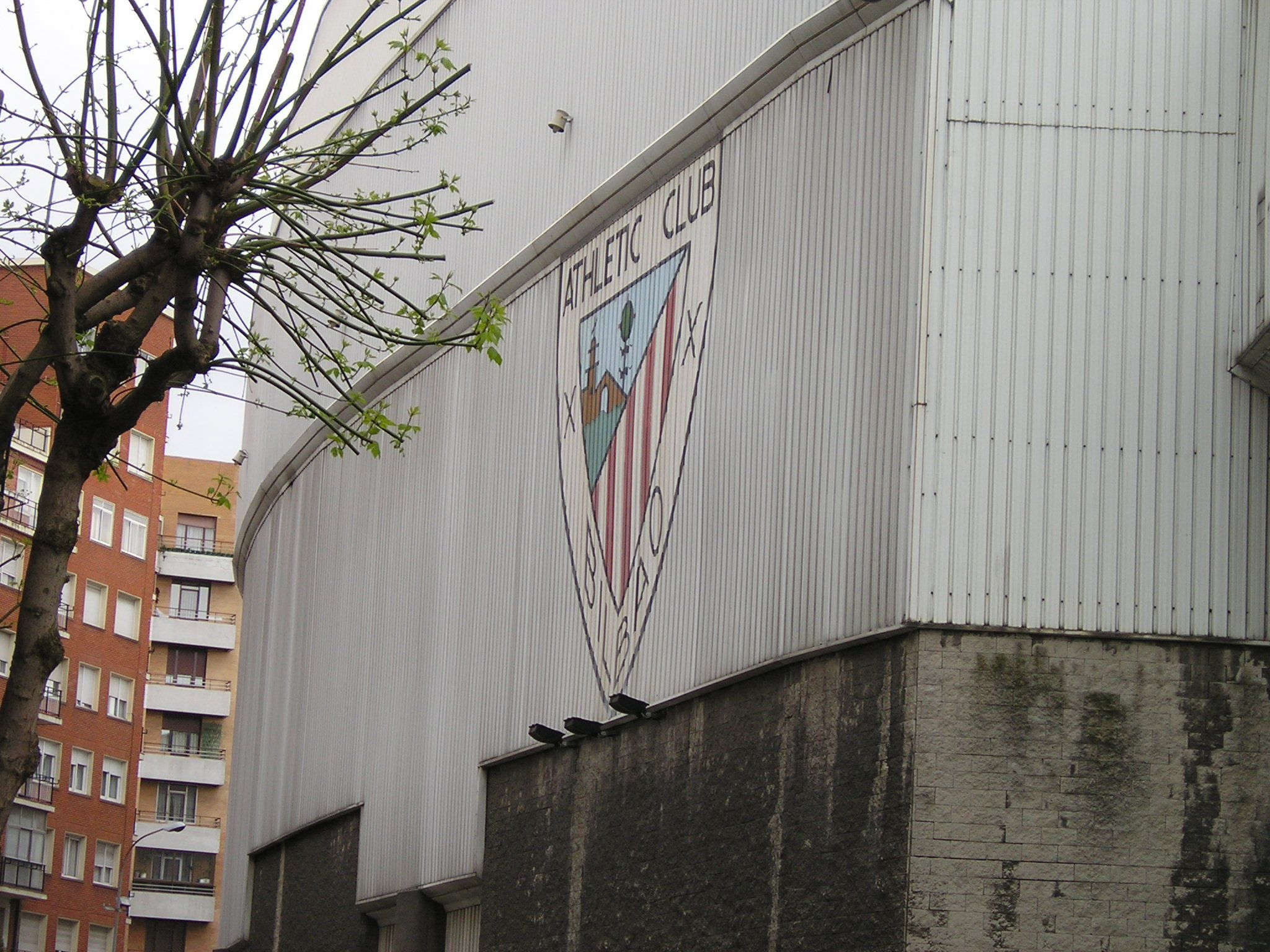 San Mames, Athletic Clubaren futbol zelaia